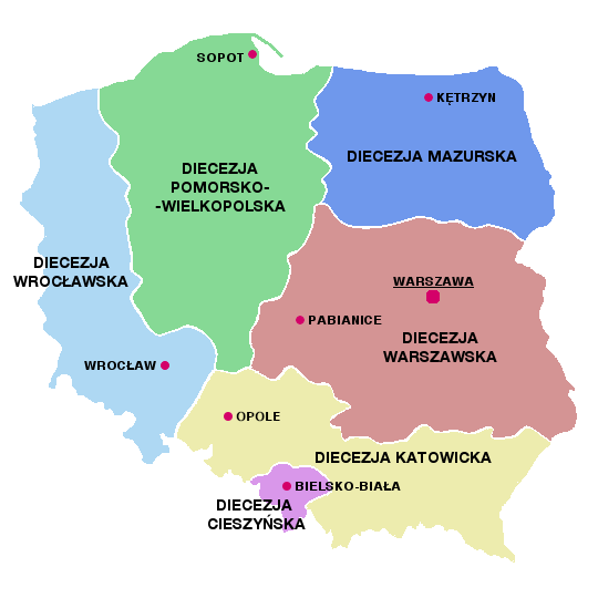 Podział administracyjny Kościoła Ewangelicko-Augsburskiego w RP